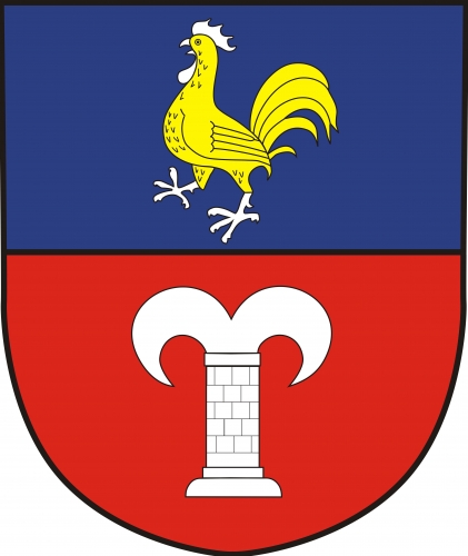 znak,Petrovice , okres Třebíč